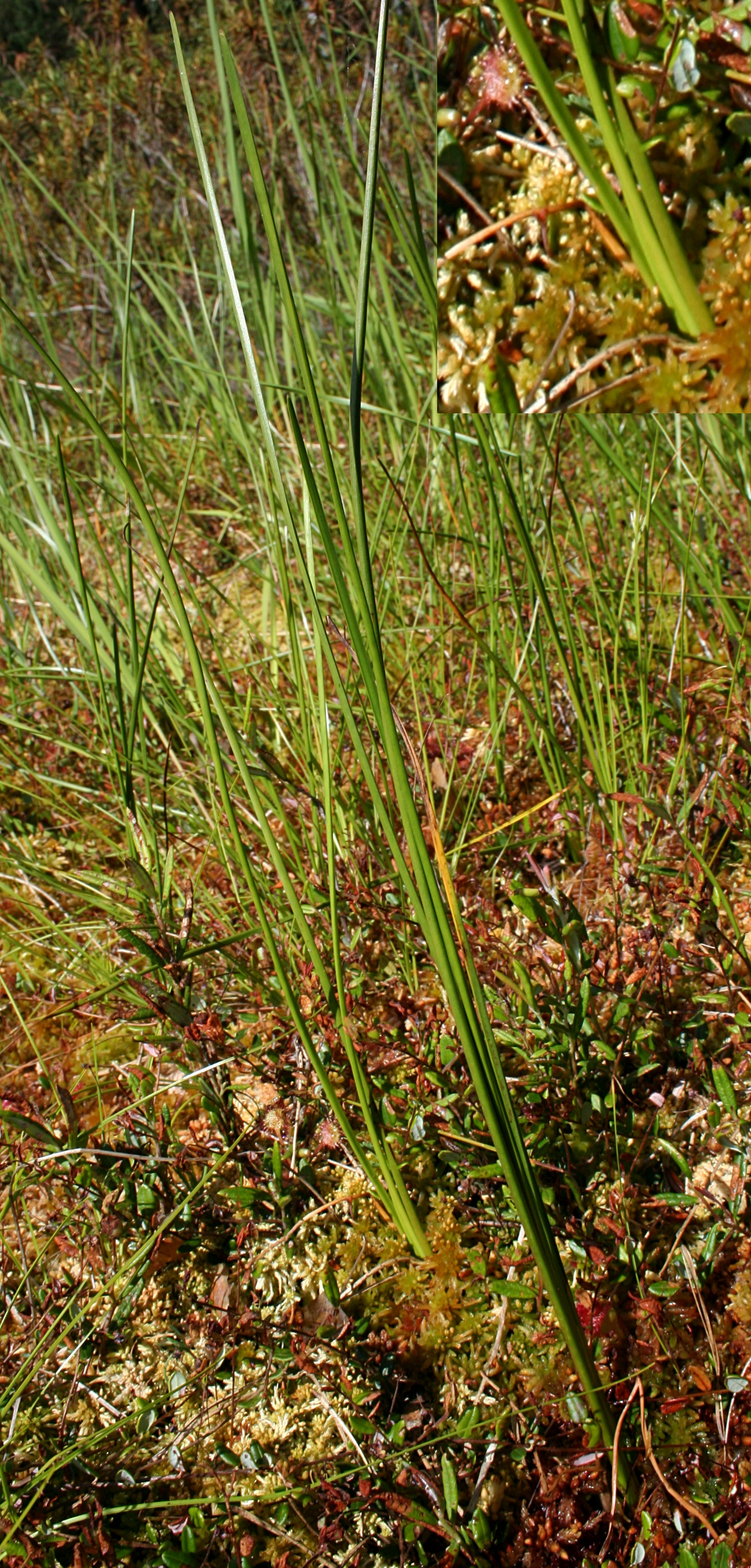 Zaborski Park Krajobrazowy, pokrój turzycy bagiennej